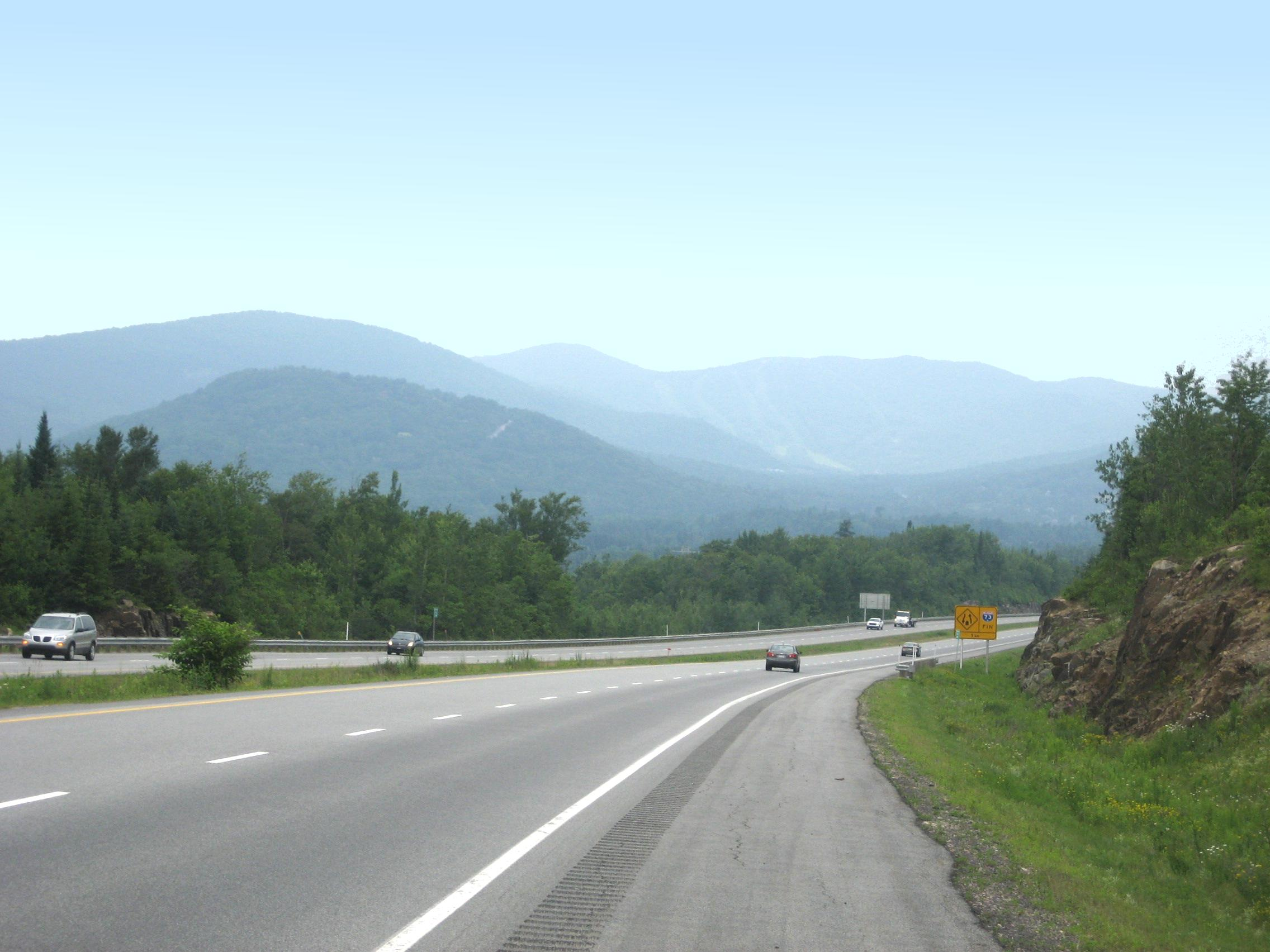 Autoroute 73 à Stoneham Québec Canada avec en arrière plan Vermont-sur-le-Lac et le centre de Ski